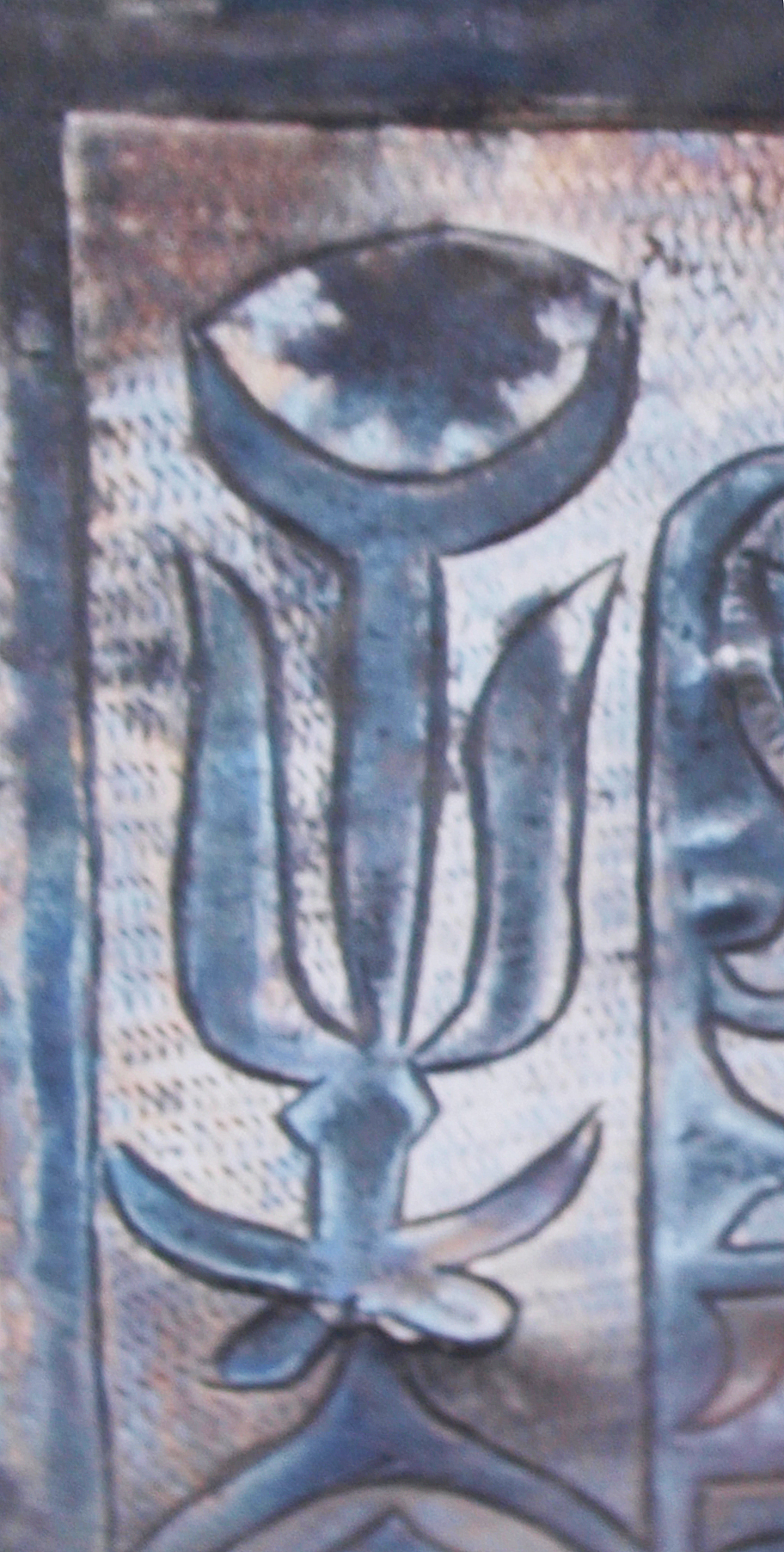 Орнамент Муаззам Урду. Орнамент на артефакті, виявлений на місці літньої ставки золотоординського хана